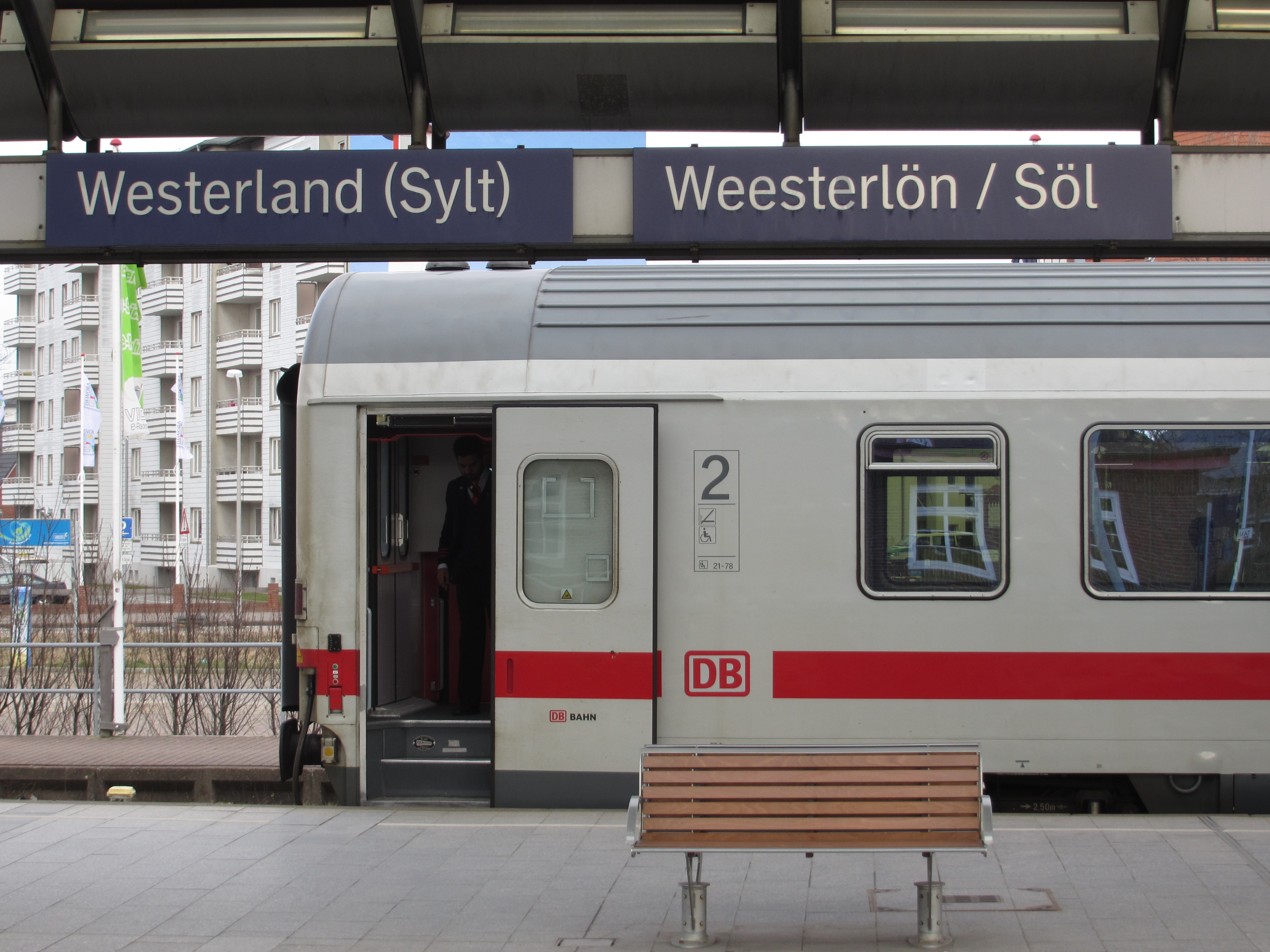 Sylt, Bahnhof Westerland (Sylt), Weesterlön (Söl), zweisprachiges Bahnhofsschild, Stationsschild